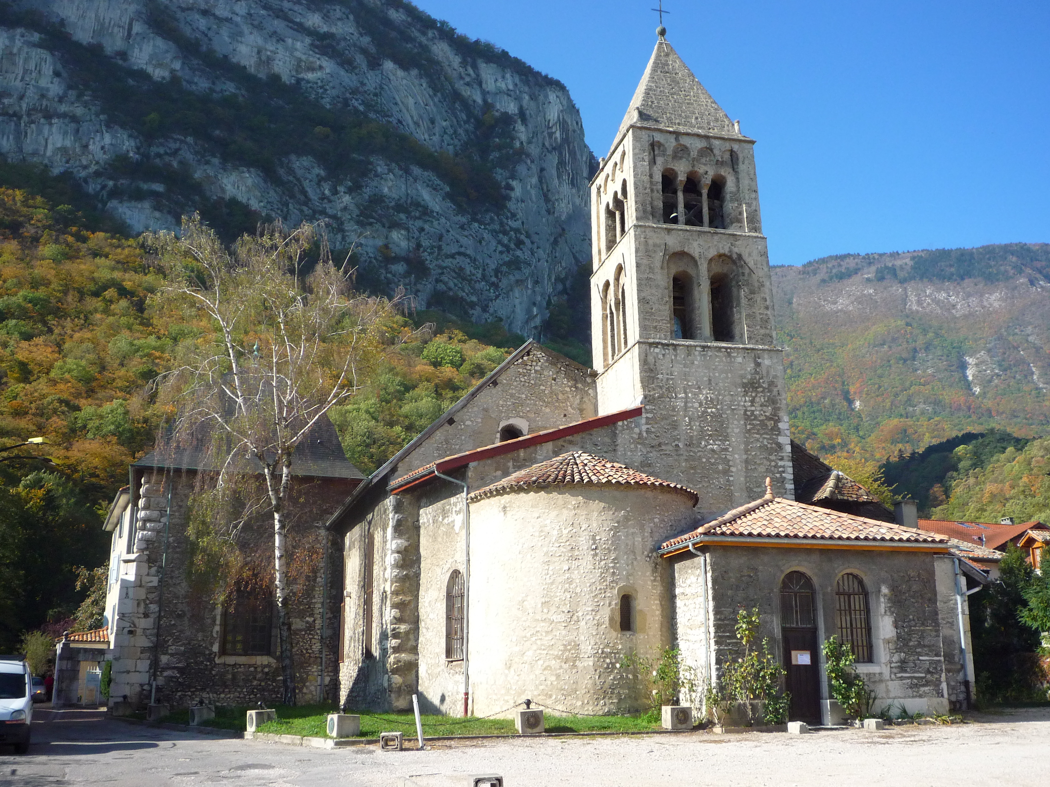 Eglise Saint Pierre (1080) dans le centre de Sassenage (Isère)